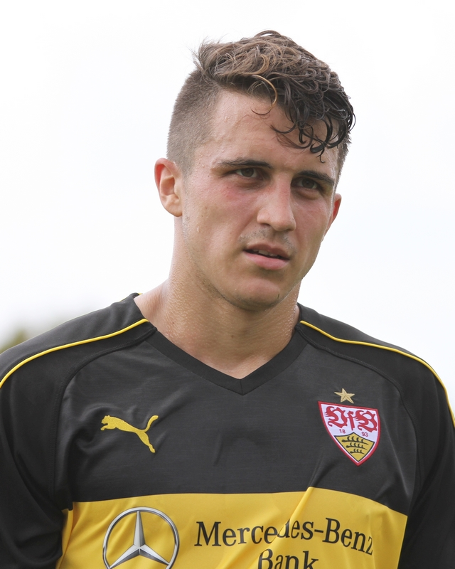 Marc Oliver Kempf beim offiziellen Trainingsauftakt. Aufgenommen von